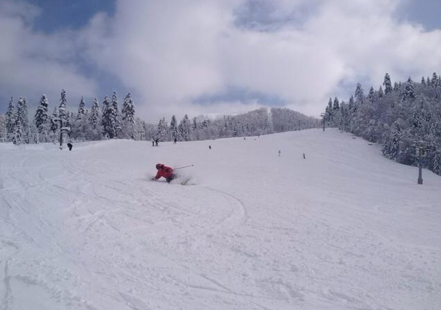 Isi gjatë stërvitjes.